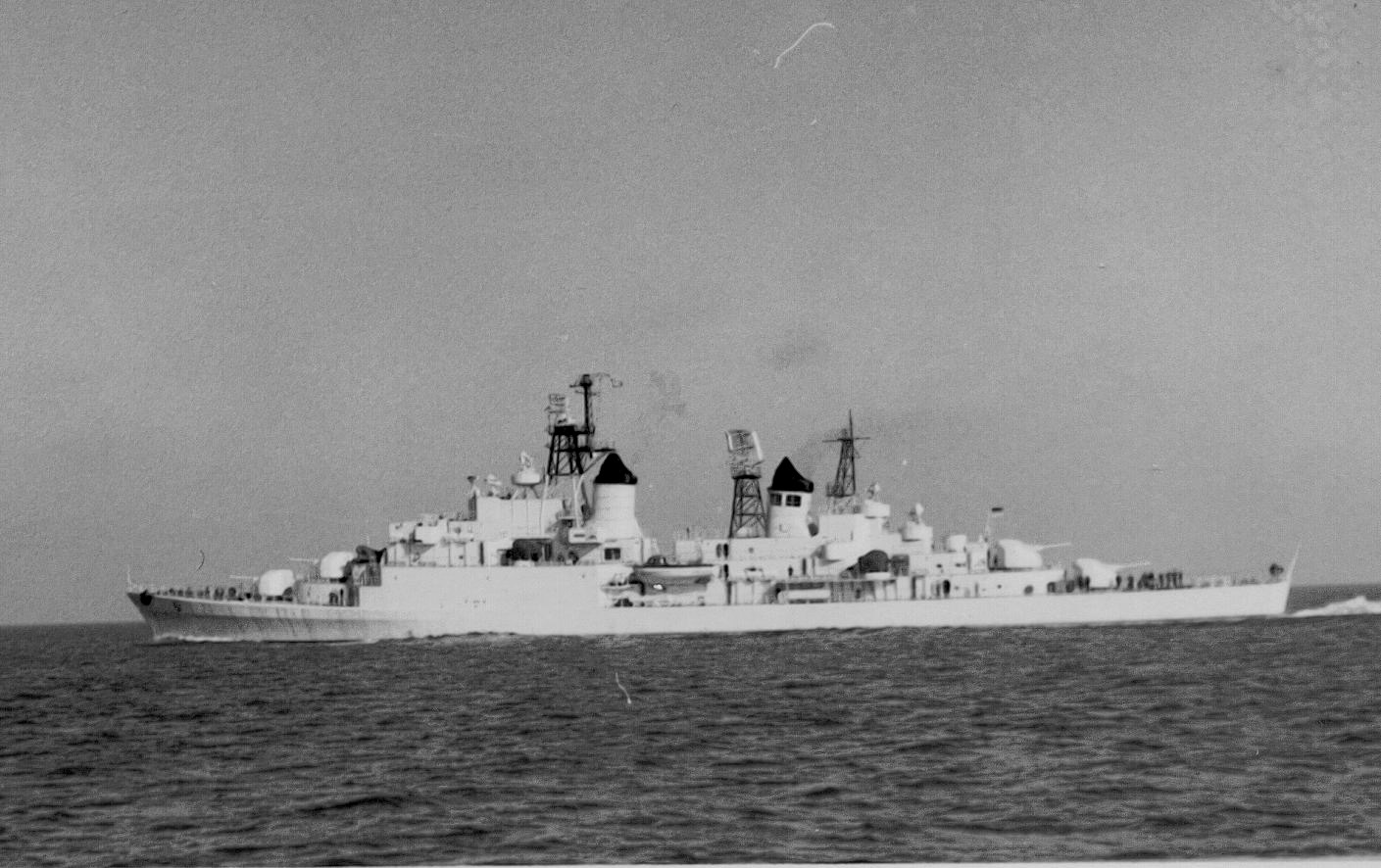 Zerstörer Hamburg-Klasse F.Lang eig.Bild 1966